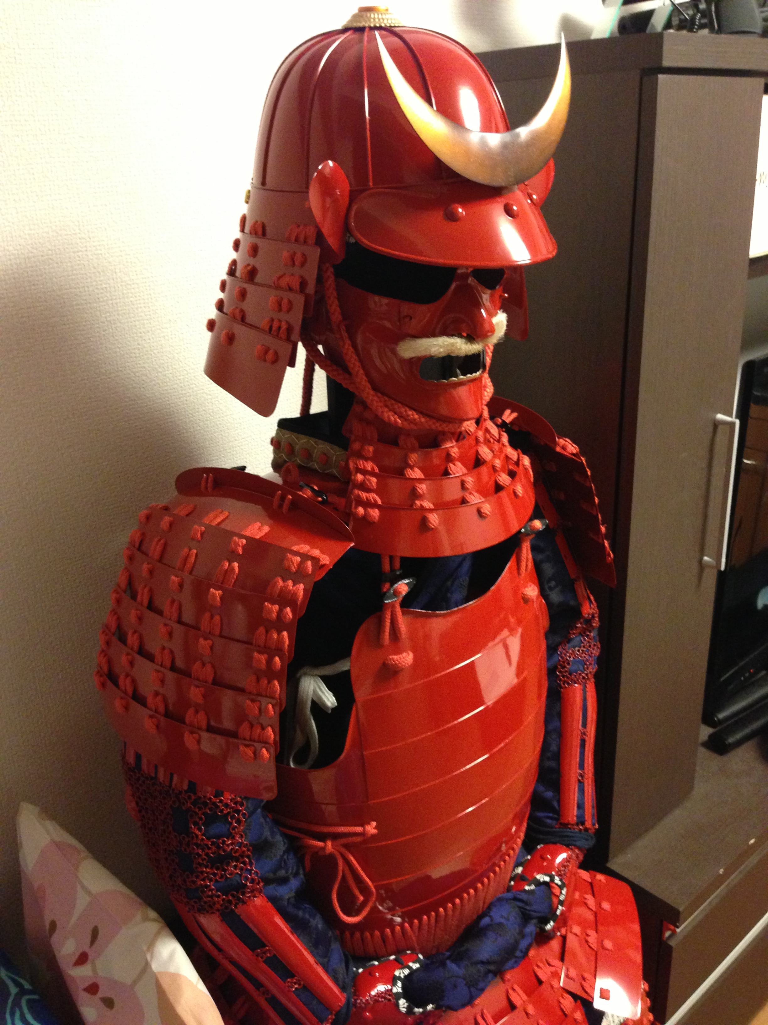 赤備えの甲冑です。※個人蔵